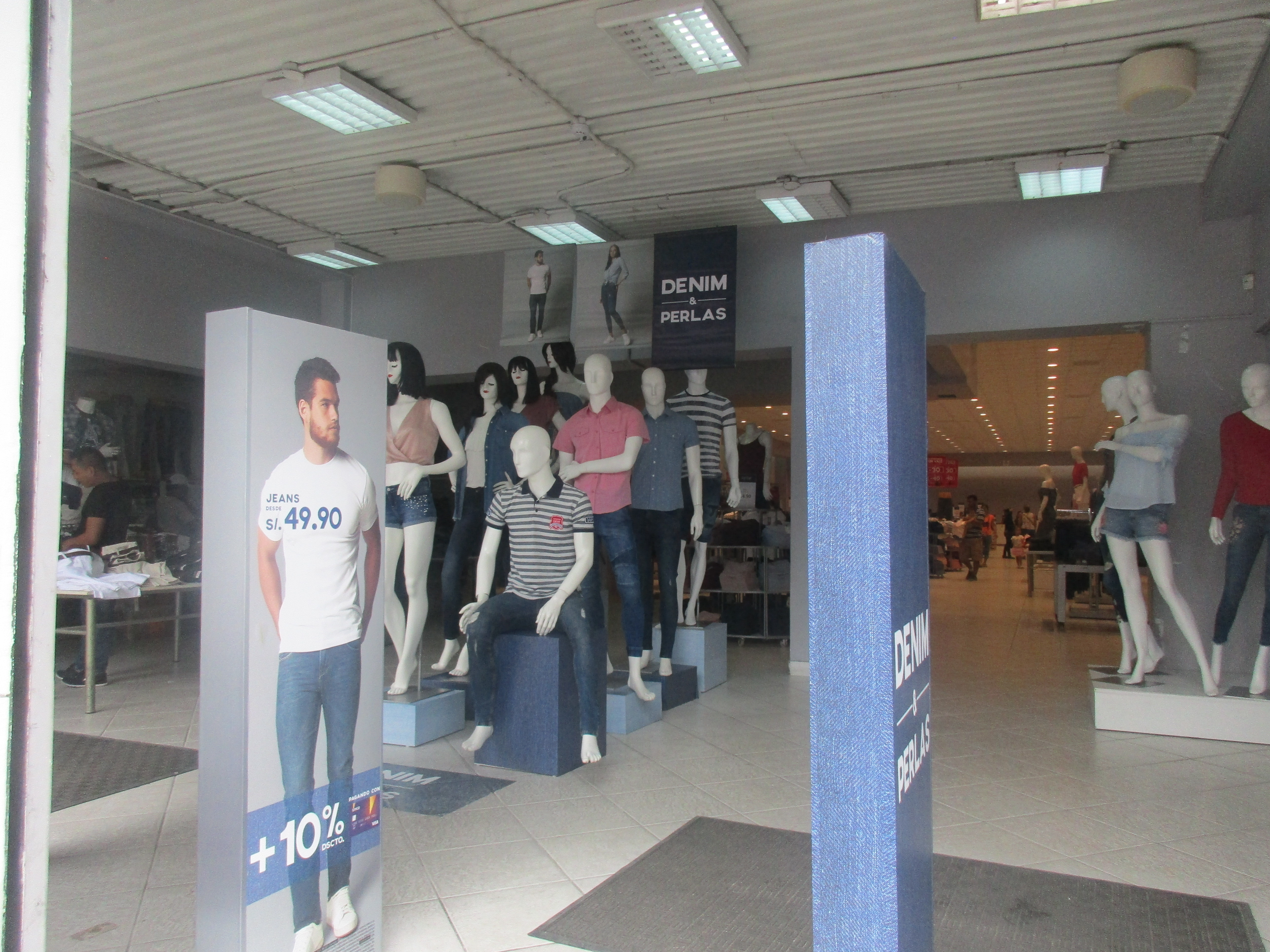 Topitop en Iquitos